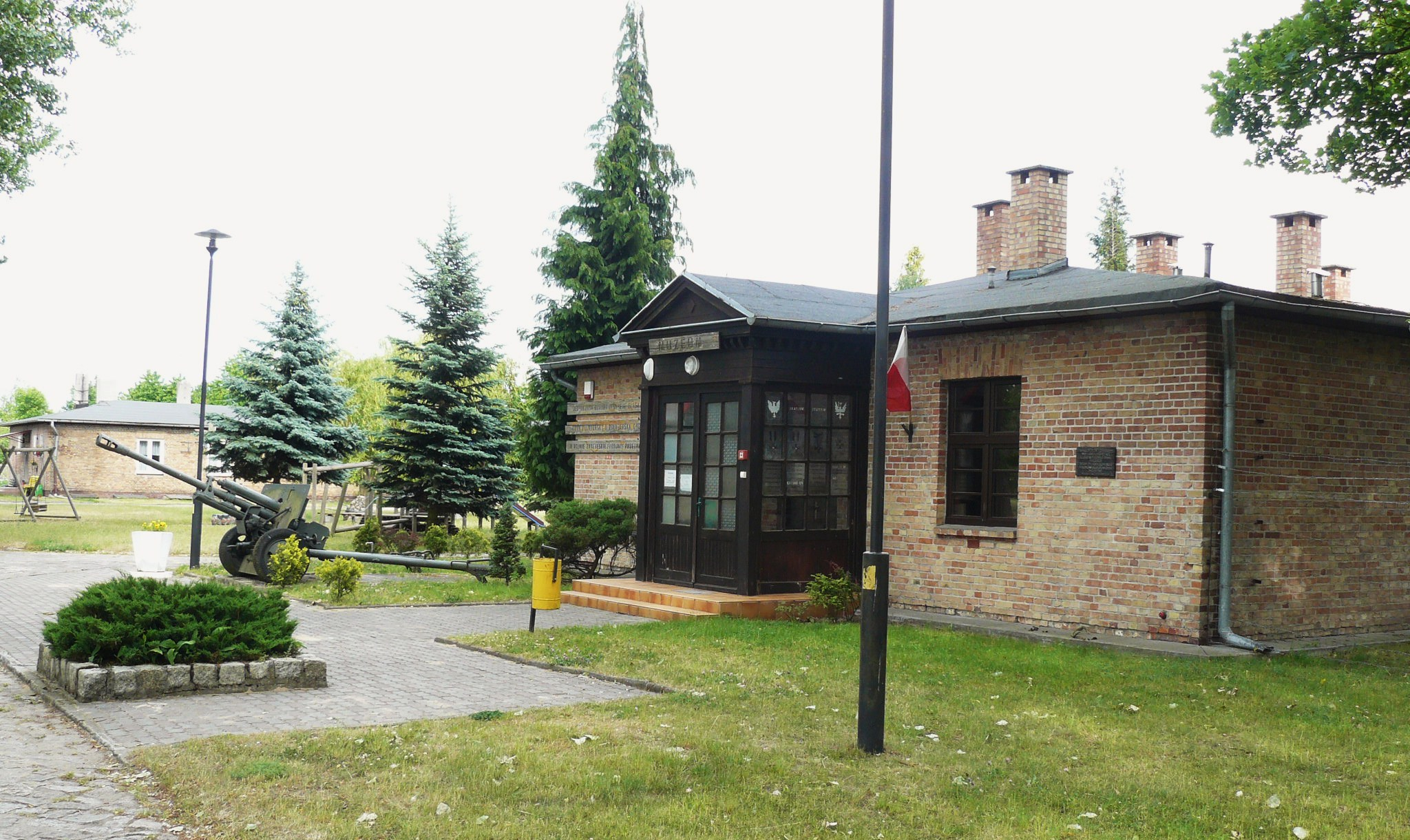 Muzeum Oflagu II C Woldenberg w Dobiegniewie.